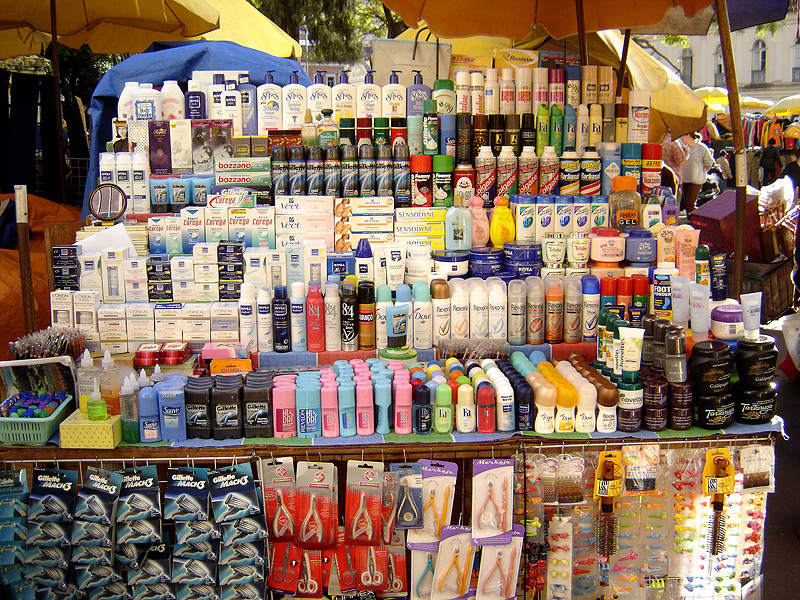 banca de camelô na Praça XV, em Porto Alegre, Brasil.